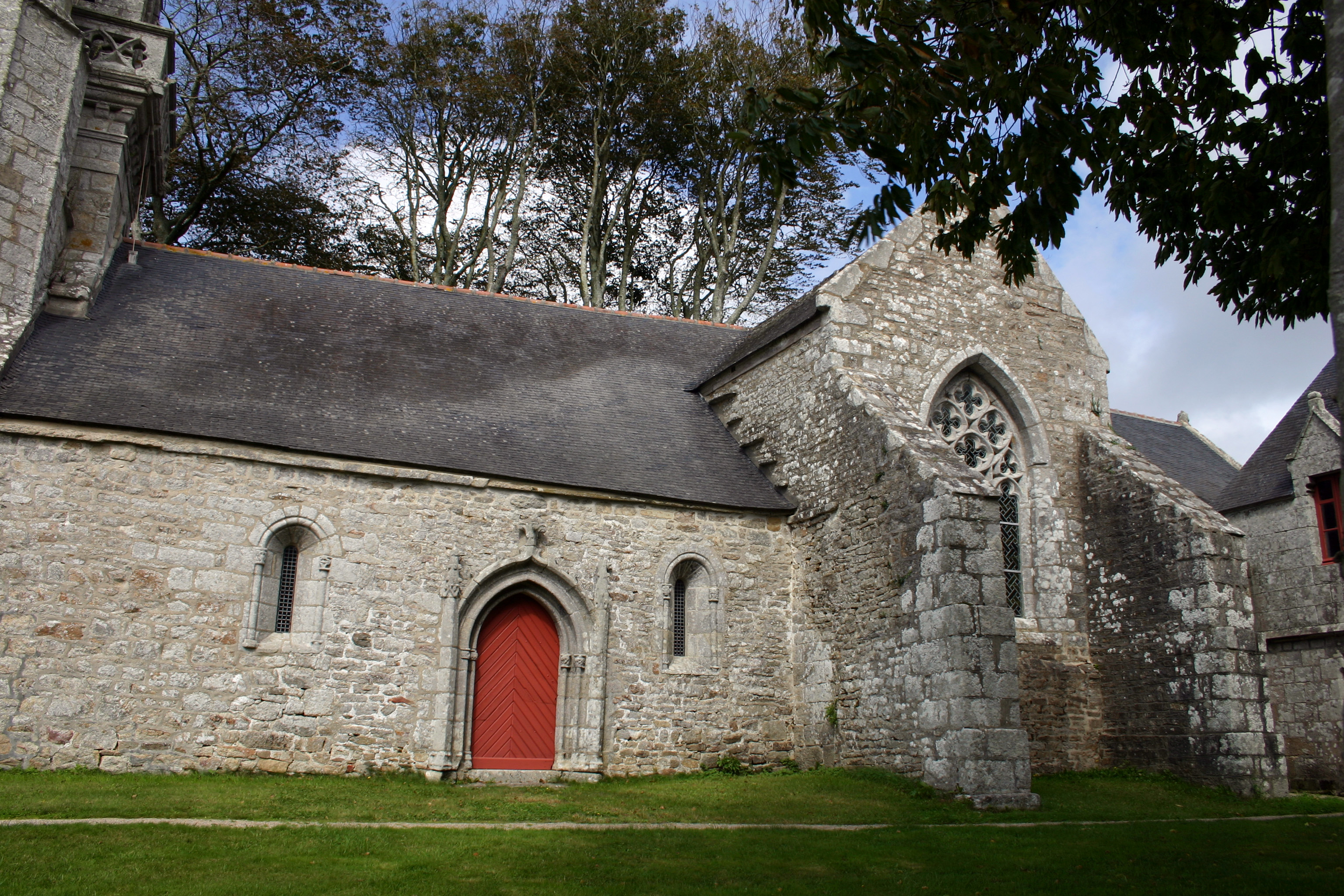 Chapelle Notre-Dame de Kérinec-Poullan-sur-Mer-Finistère-Bretagne-France .